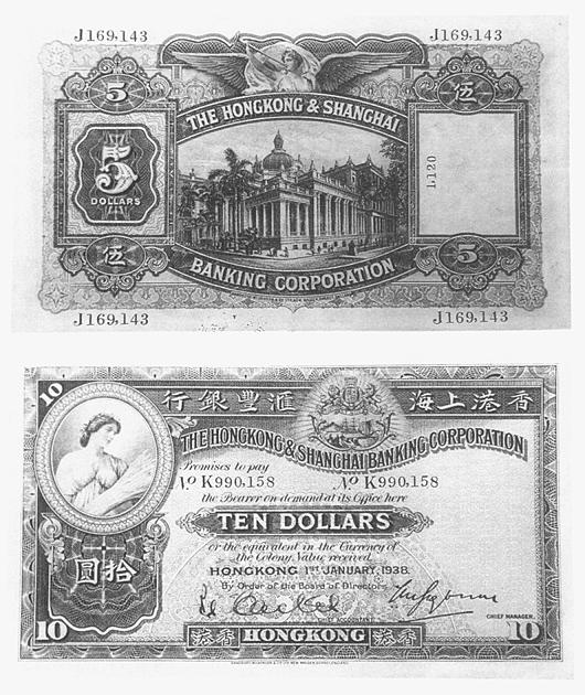 豐大班祈禮賓在香港日治時期，在沒有保證金的情況下，被日方威迫簽署一批未發行的滙豐紙幣，總值1.198億港元。圖為其中一張五元和十元紙幣。五元紙幣右邊空格內的數字，以及十元紙幣標示的不尋常序號，暗示這兩張是「迫簽紙幣」。